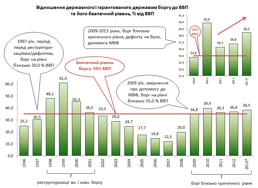 Побудовано автором на основі даних Мінфіну та цієї публікації